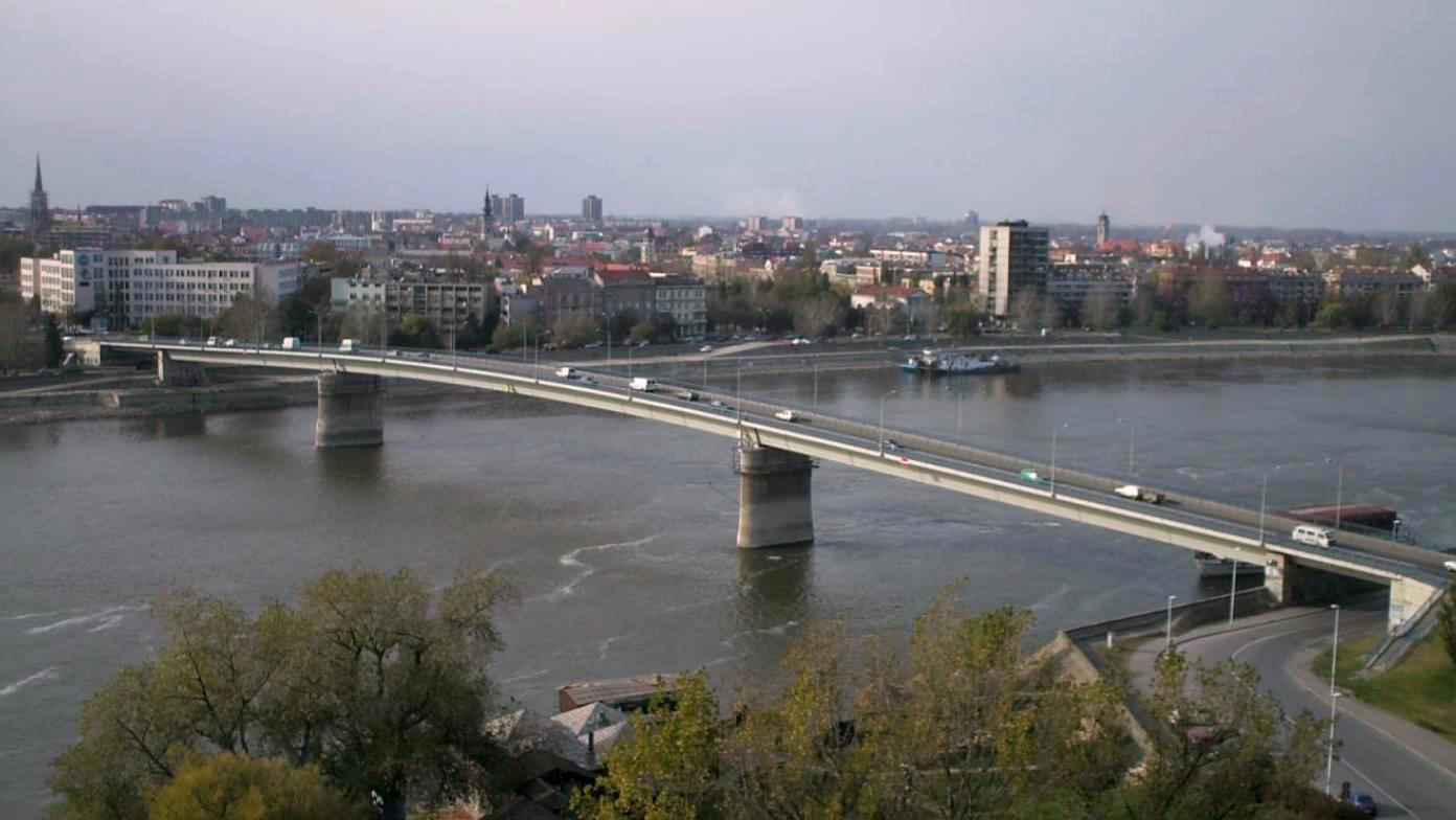 03.11.2006 _ Novi Sad / Ujvidék